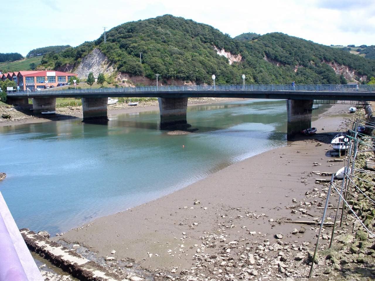 Ría del Urola, Zumaia